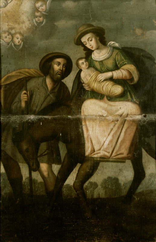 Oleo "La Huida a Egipto" de Baltasar de Figueroa, El Viejo.